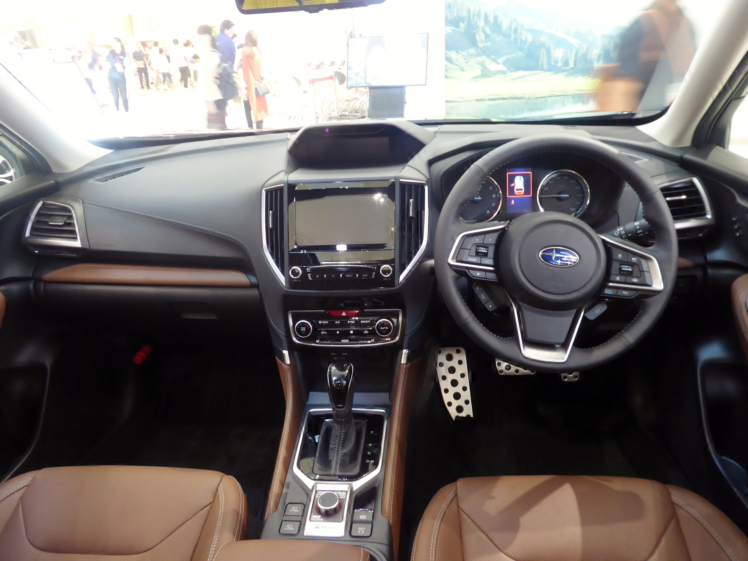 5AA-SKE型スバル・フォレスターAdvanceのインテリアを撮影。